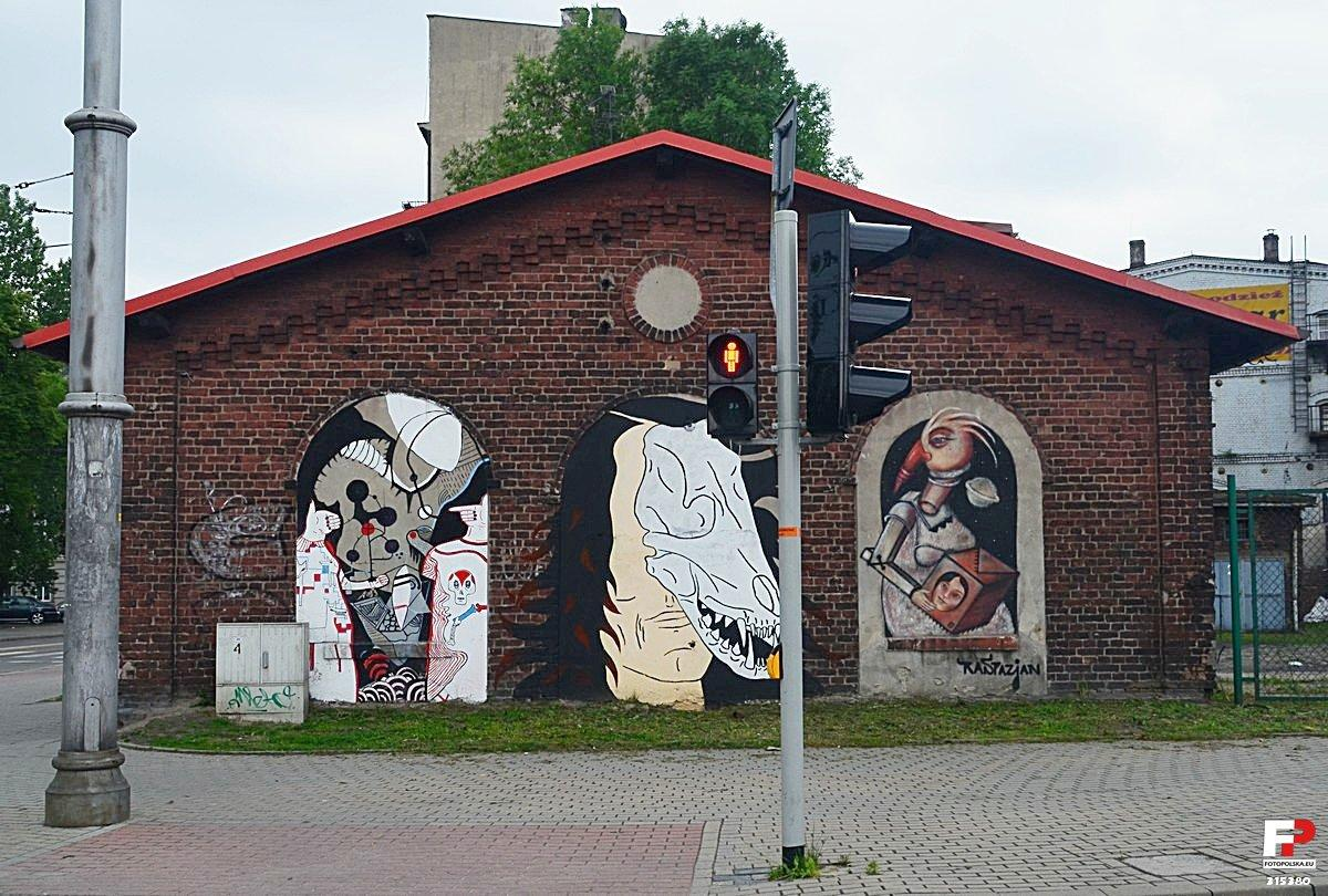 Widok budynku nr 26 od strony skrzyżowania